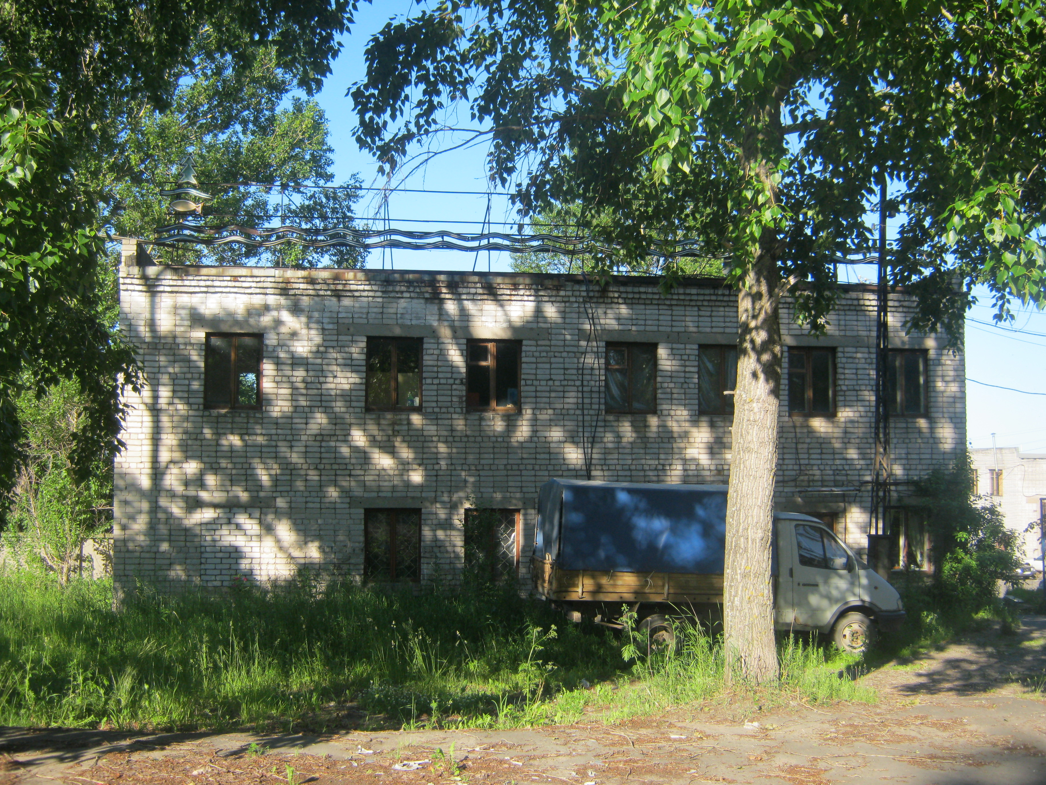 Промышленность Петрозаводска